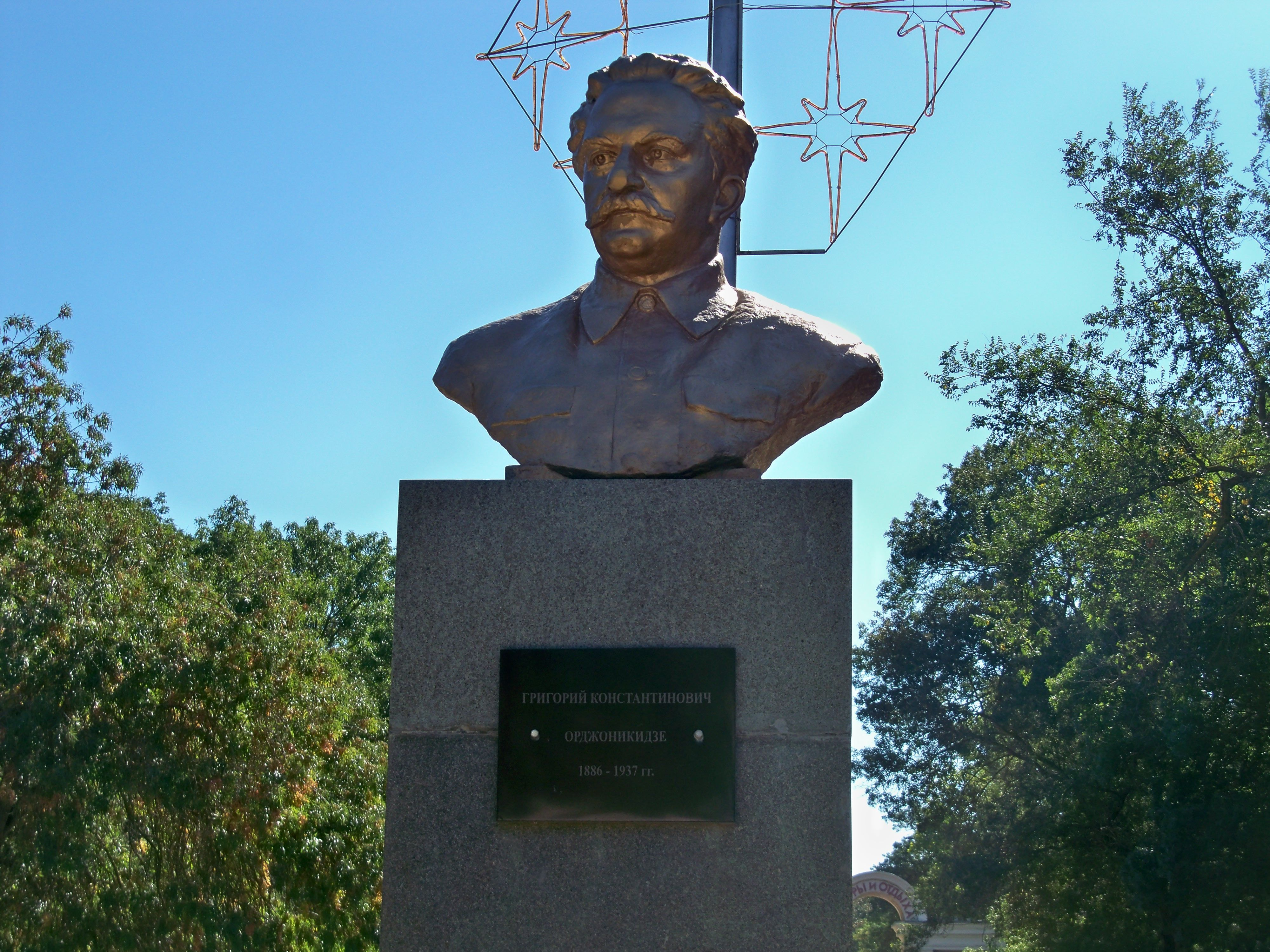 Пам'ятник Г. К. Орджонікідзе., Керч, вул. Орджонікідзе, біля входу в парк